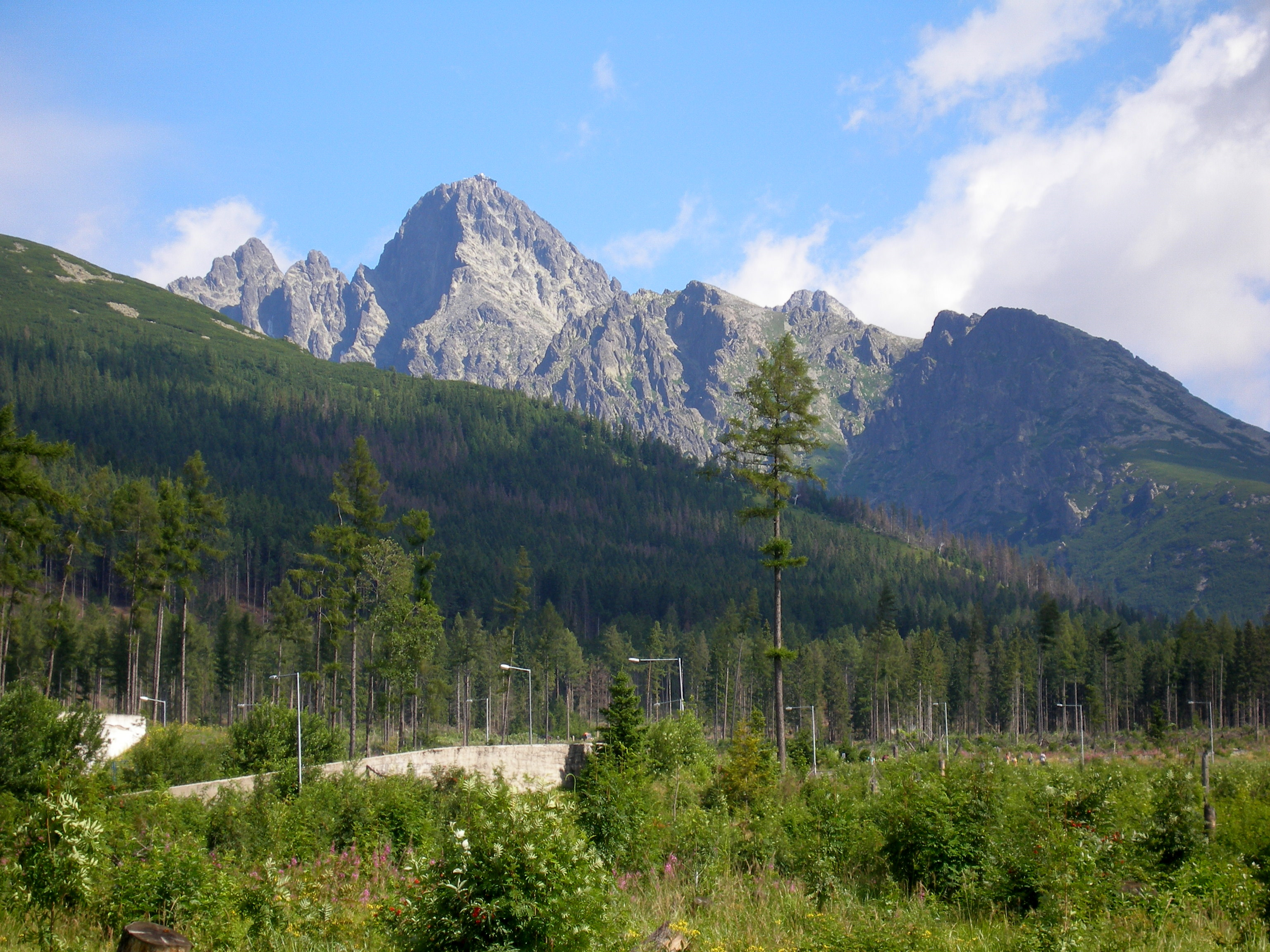 Mesto Vysoké Tatry. Cestou zo Starého Smokovca na Hrebienok.